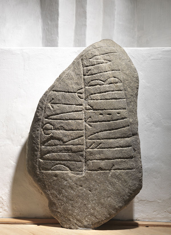 Foto: Nationalmuseet ved Roberto Fortuna